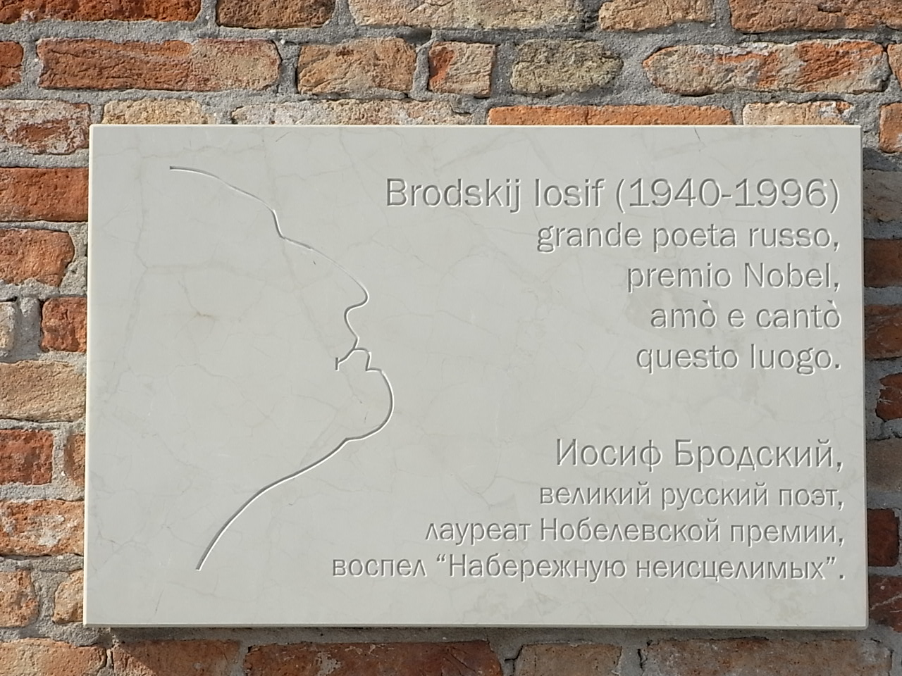 Gedenktafel für Iosif Brodskij in Venedig